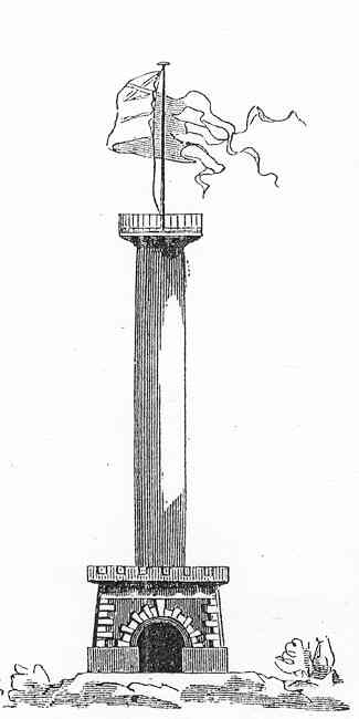 Utsiktstornet Ersta kolonn. Även känt som Tandpetaren på Söder. Byggnadsår 1827. Arkitekt Fredrik Blom